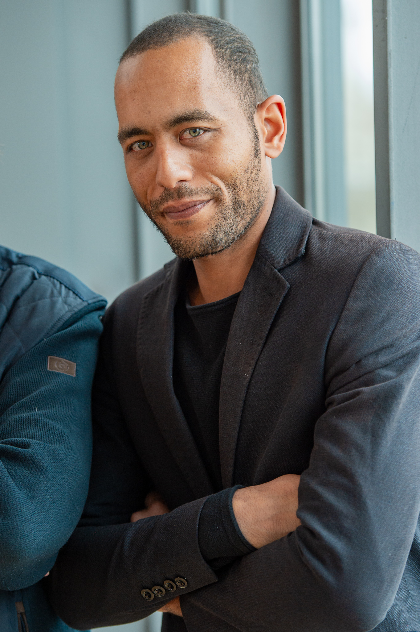 BR,Bayerischer Rundfunk,Bayerisches Fernsehen,Benedikt Beissl,Filmbrunch 2019,Literaturhaus München